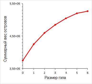 Зависимость суммарного веса островов относительно размера гэпа